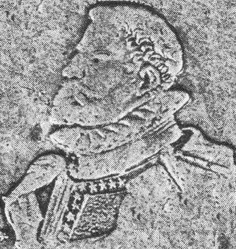 Die Urheberrechts-Schutzdauer des hier abgebildeten Kunstwerks ist weltweit abgelaufen, da der Künstler bereits seit über 70 Jahren tot ist. Es ist somit gemeinfrei („public domain“). Ebenfalls gemeinfrei ist die vorliegende fotografische Wiedergabe des flächigen Werkes, da sie keine eigene Schöpfungshöhe aufweist.